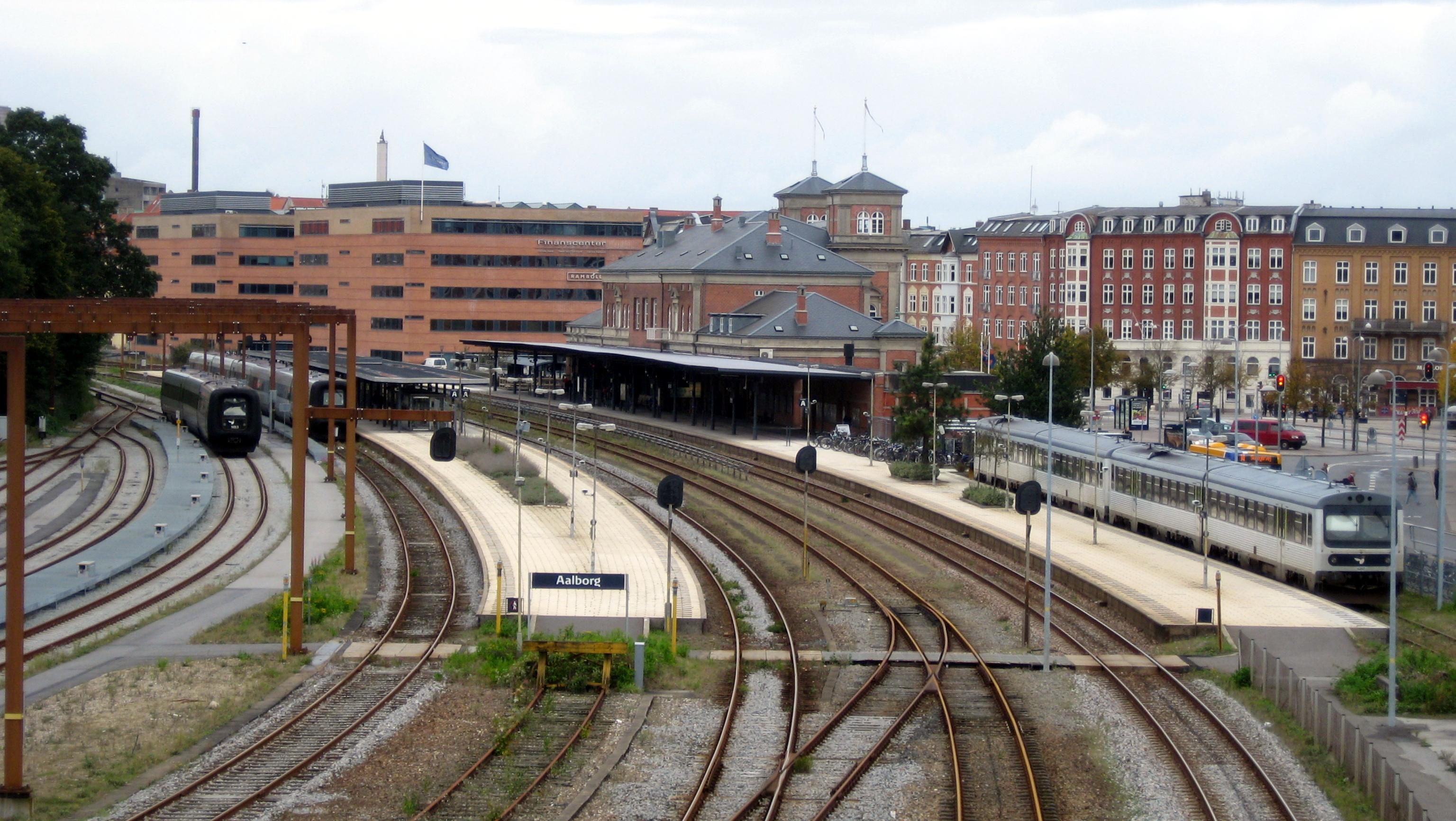 Banegården i Aalborg